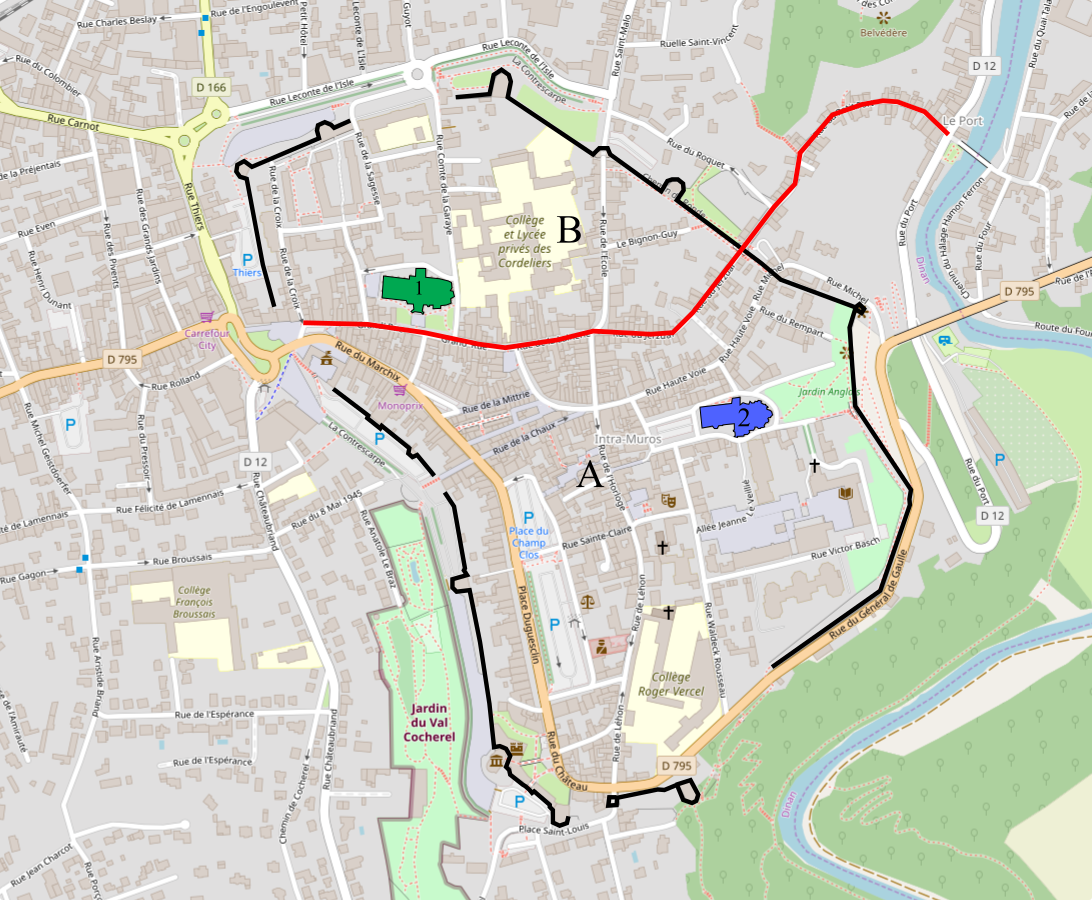 En vert, l'église Saint-Malo En bleu, l'église Saint-Sauveur Le trait rouge est la délimitation entre les deux paroisses Le trait noir est ce qui reste des remparts aujourd'hui